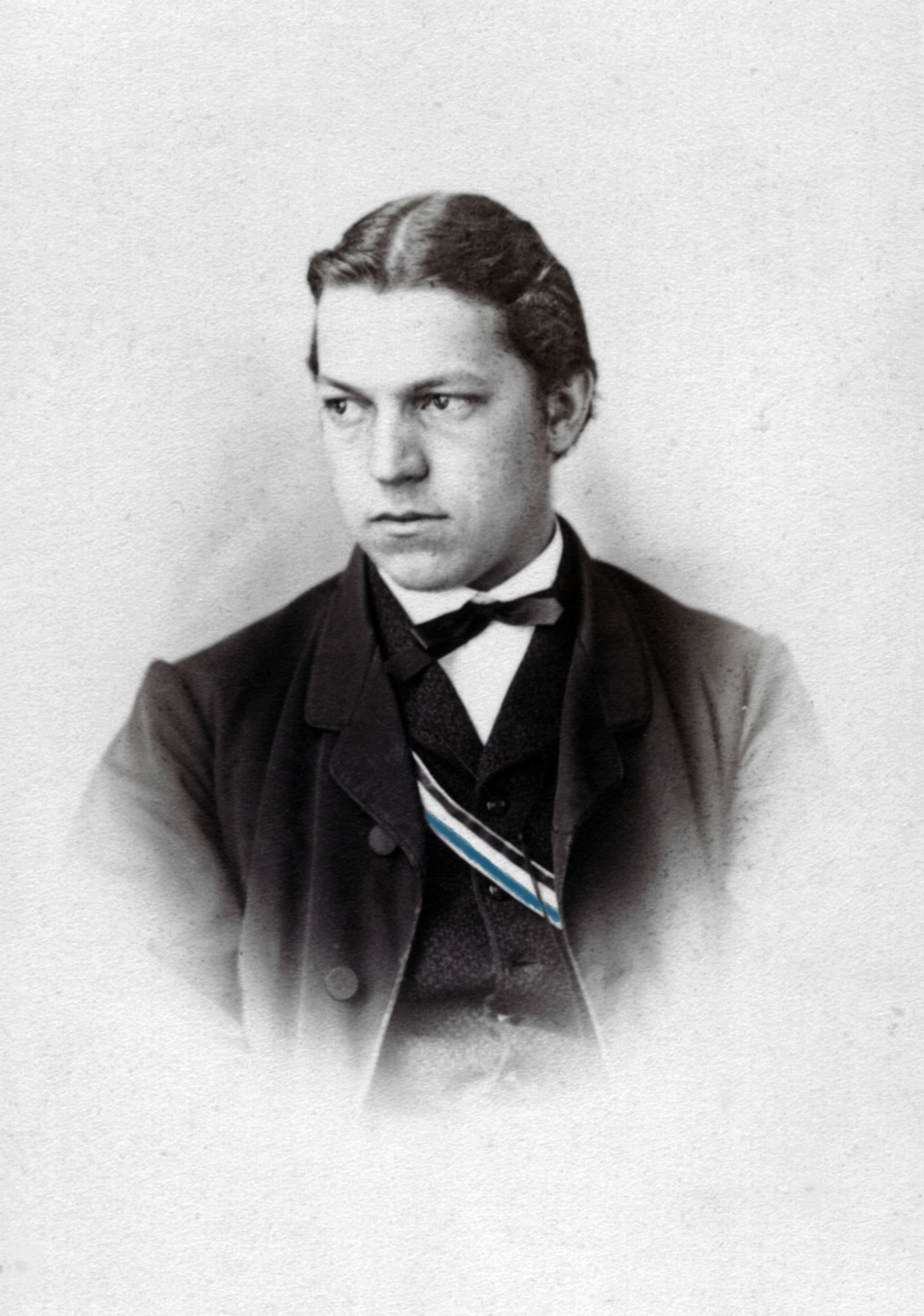 Porträtfotografie des späteren Hygienikers Josef Forster